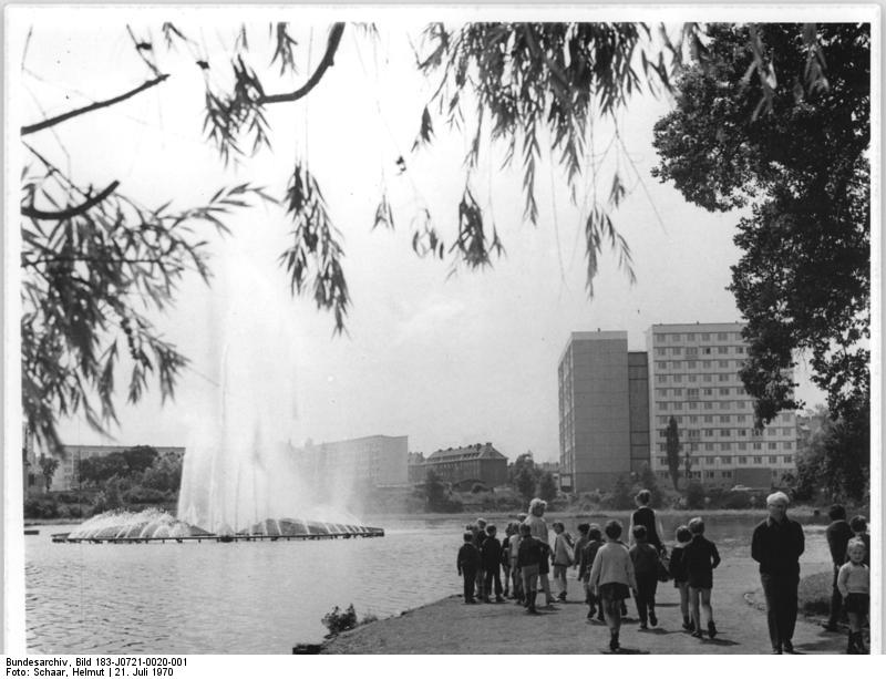 Merseburg, Gotthardteich, Springbrunnen Zentralbild Schaar 21-7-70-kat Bez. Halle: Stadtzentrum Merseburg-Inmitten des Merseburger Stadtzentrums gelegen bieten die Parkanlagen um den Gotthardteich den Einwohnern der Stadt Ruhe und Entspannung.